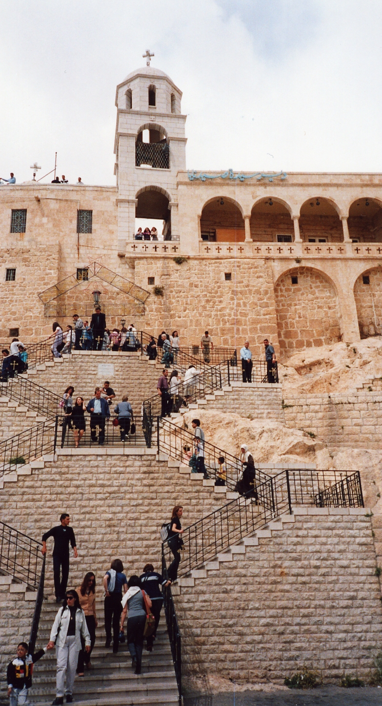 Monastery as Seidnaya, Syria Photo: Soman